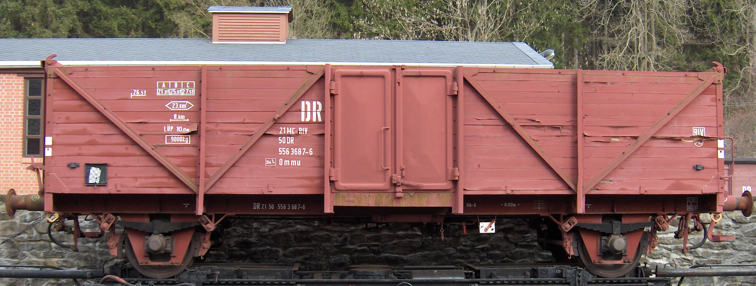 Omm-Wagen der Kriegsbauart, gebaut ab 1942, hier als Teil-Mod-Wagen der Deutschen Reichsbahn der DDR mit Blechtüren und Rollenlagern